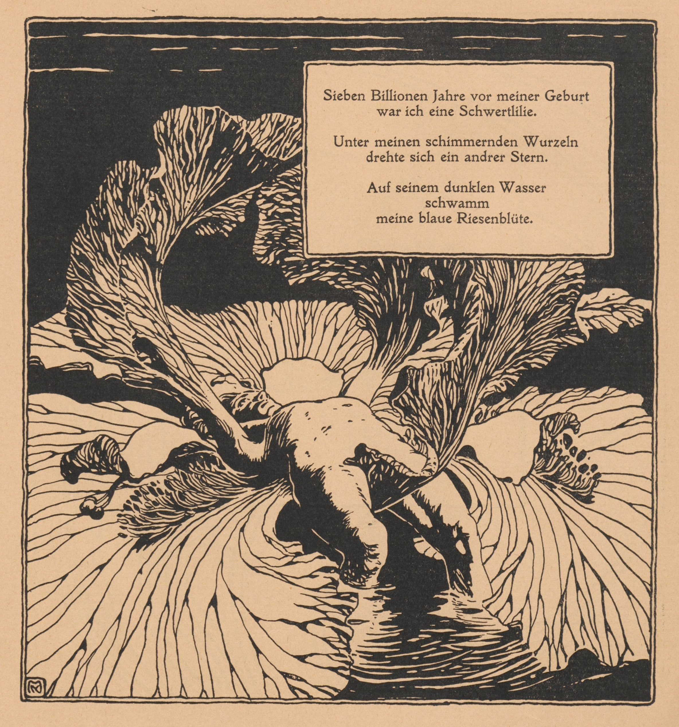 Illustration zu einem Gedicht von Arno Holz